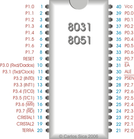 Pinagem do microcontrolador